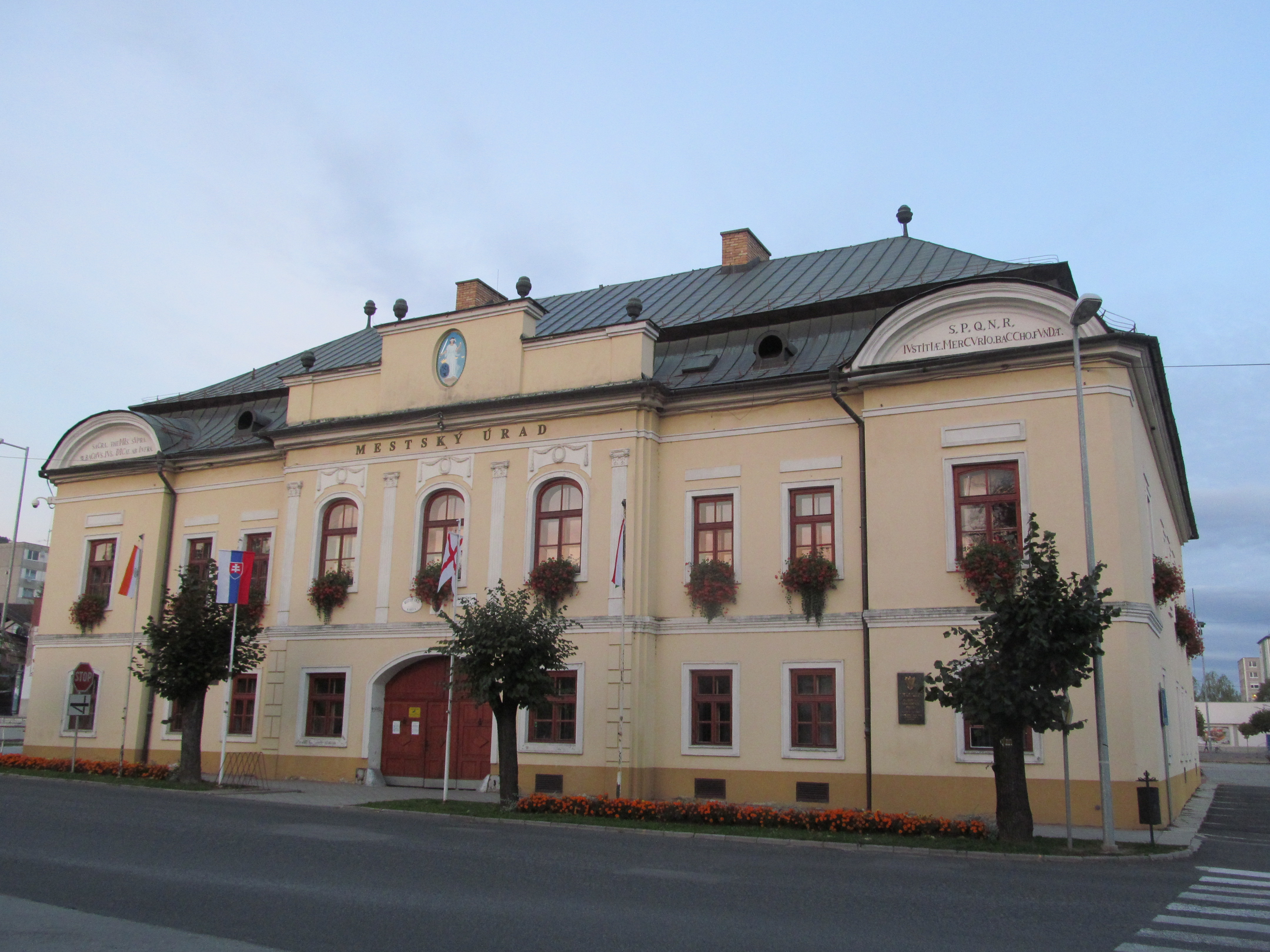 Radnica